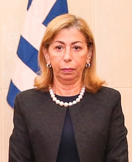 Konstantina Koliou übergibt ihre Akkreditierung als Botschafterin Griechenlands an Osttimors Staatspräsident Francisco Guterres.